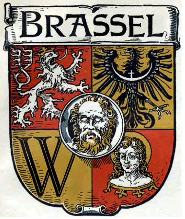 Wappen der Stadt Breslau / Brassel (Schlesische Mundart).